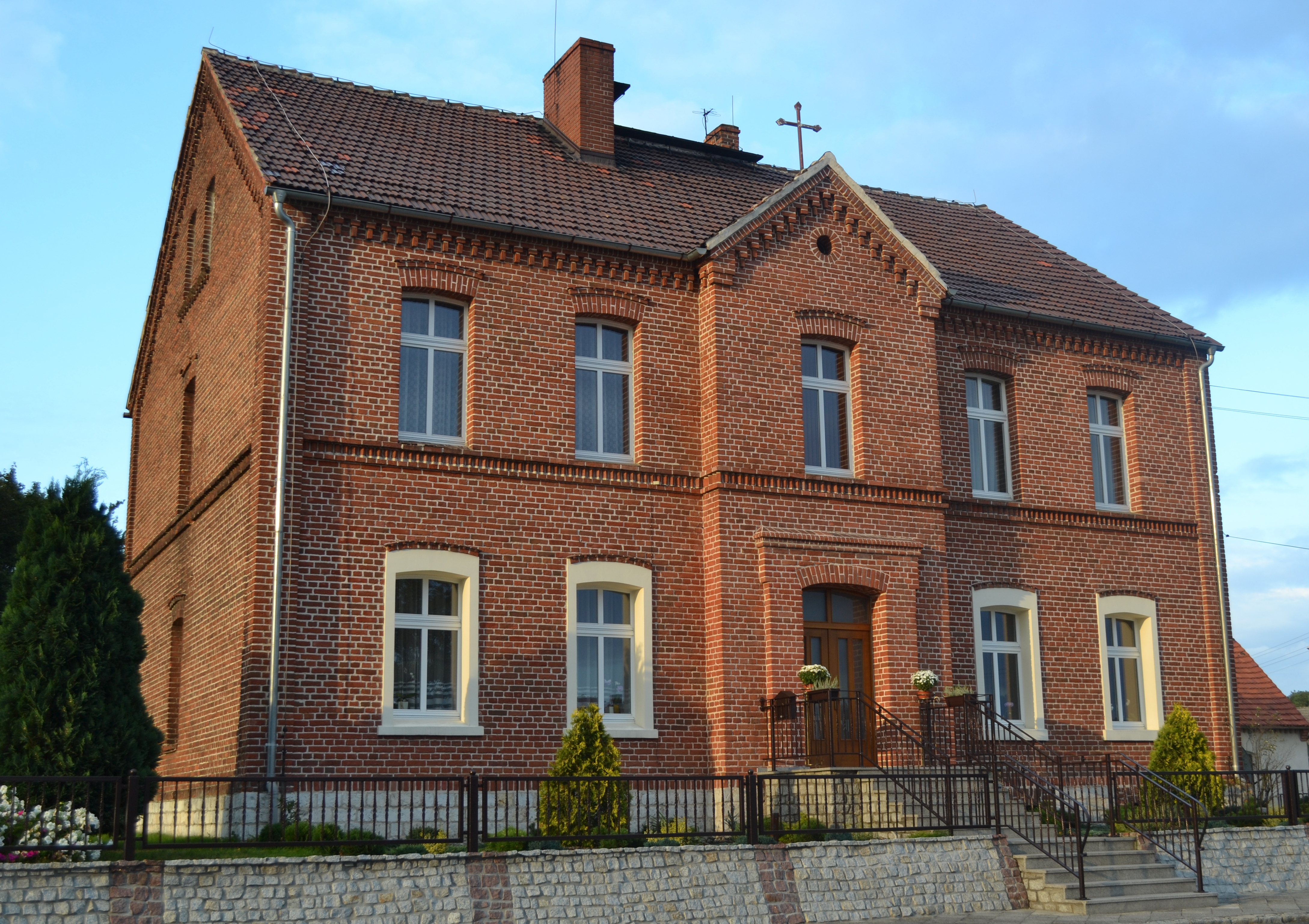 Plebania, ob. dom, drewn., XIX Stare Budkowice, ul. Ogrodowa 8, Murów 10.1966.